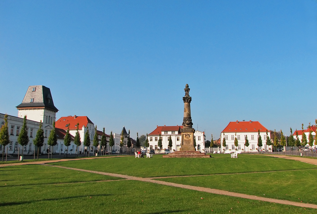 Beschreibung: Der Markt mit dem Kriegerdenkmal / Putbus / Germany Fotograf: Darkone, 12. Oktober 2005